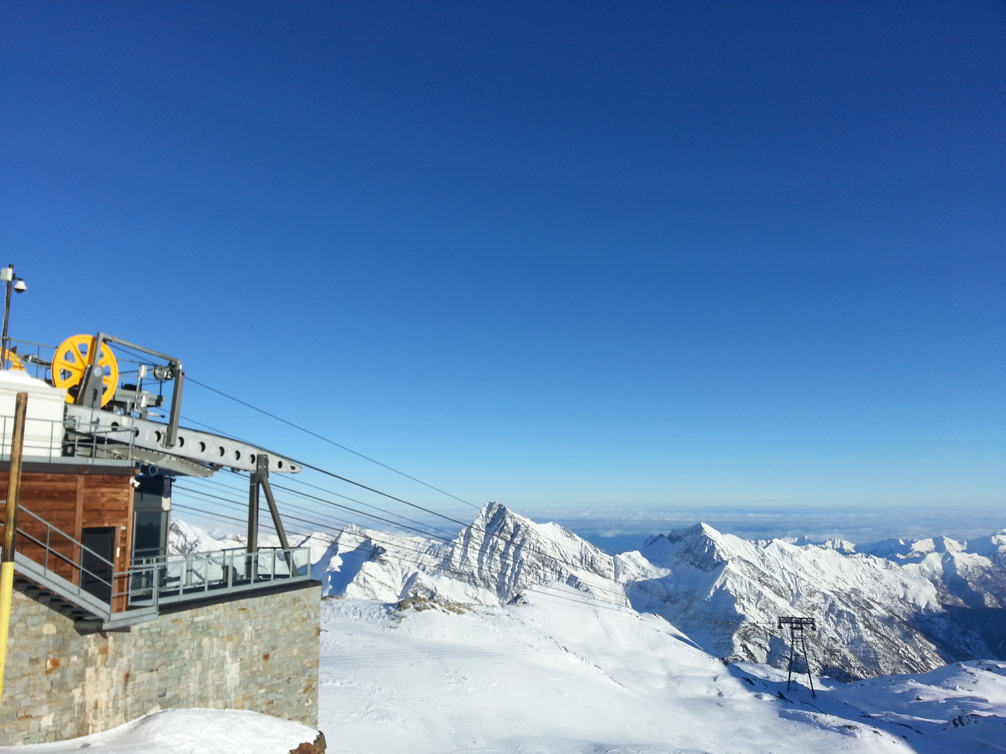 L'arrivo della Funifor che da Pianalunga raggiunge il Passo dei Salati